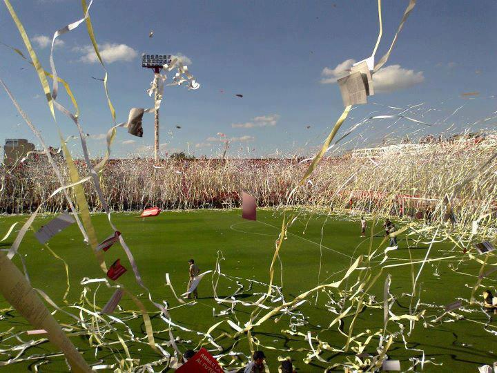 Recibimiento de la hinchada de Unión en le partido contra colon.